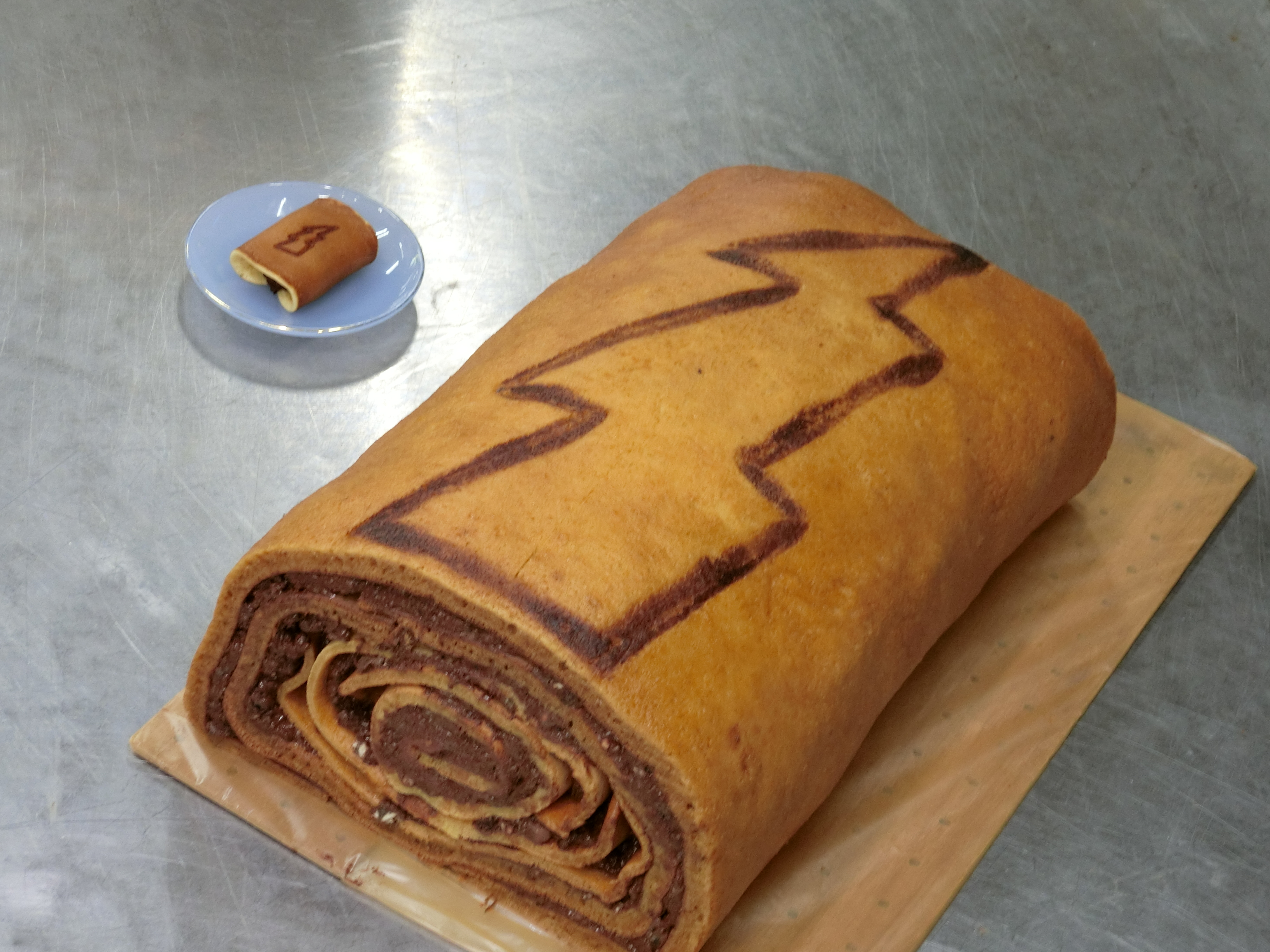 巨大ブラックブラックサンダーあん巻き